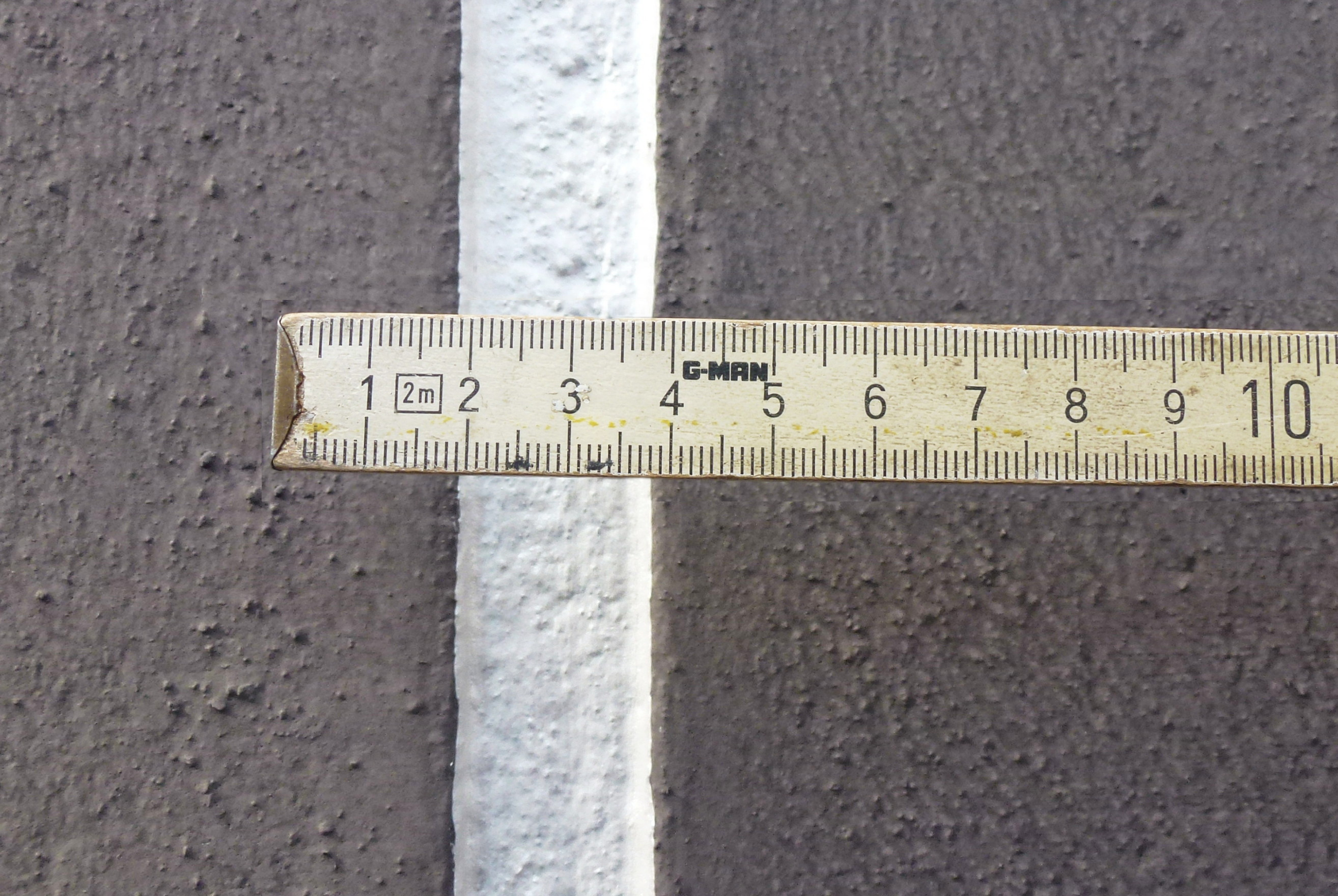 Tvålflingan 5, detalj ränder